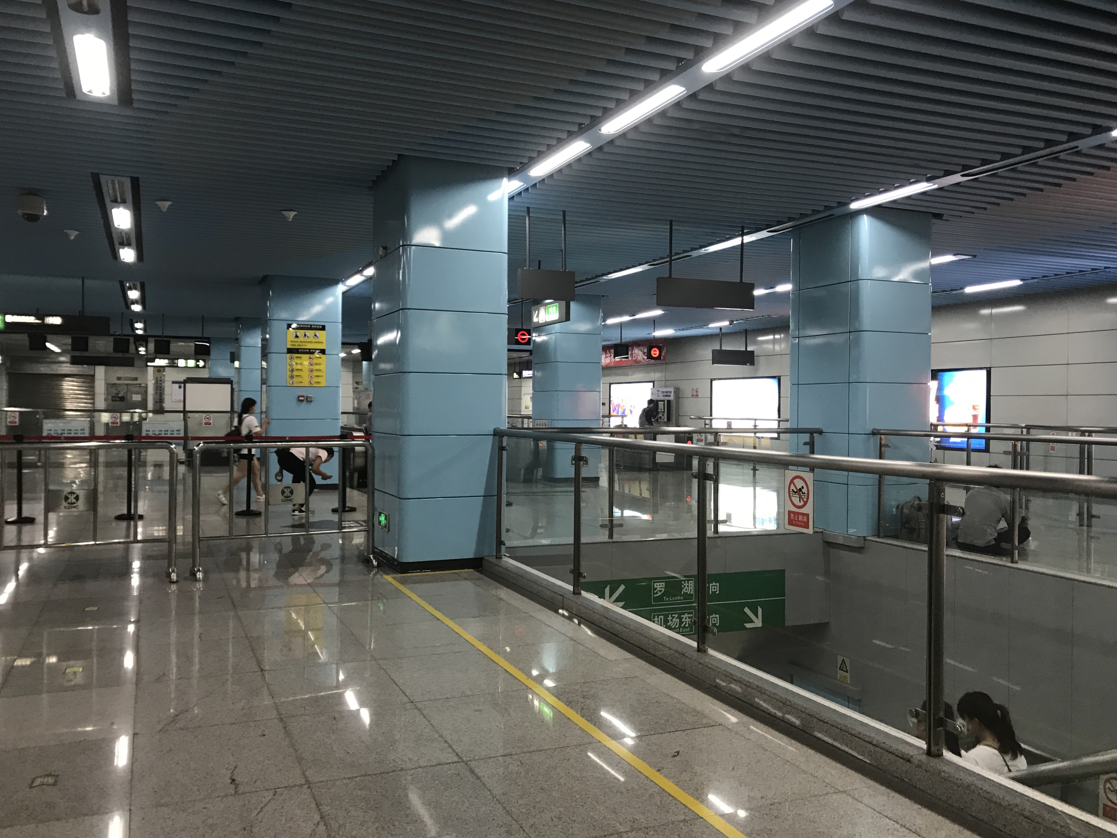 前海湾駅構内